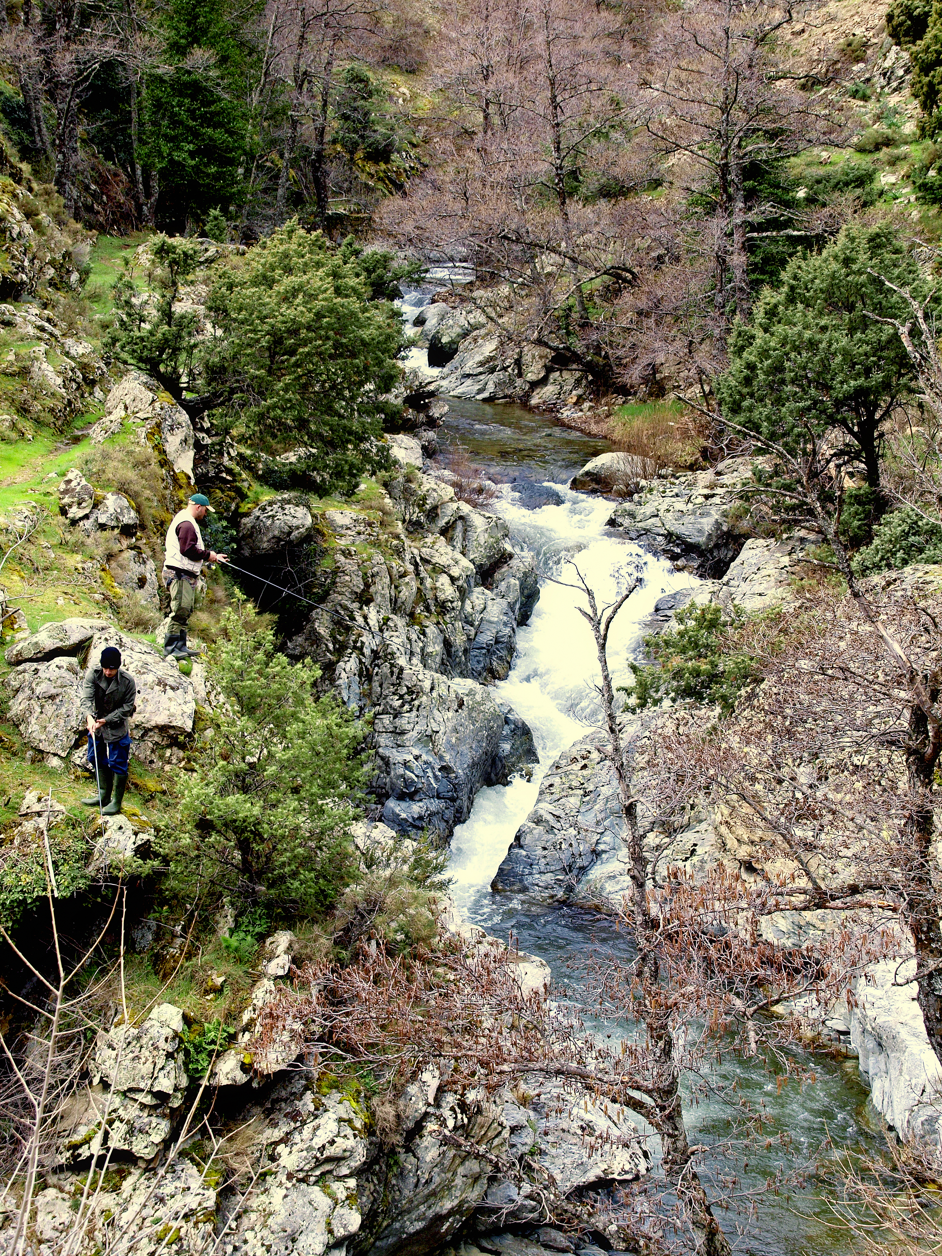 Corscia (Corsica) - Pêche à la truite dans l'Erco